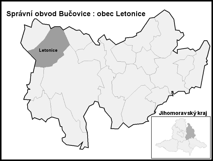 Správní obvod Bučovice : obec Letonice (Vyškov - Czech Republic)